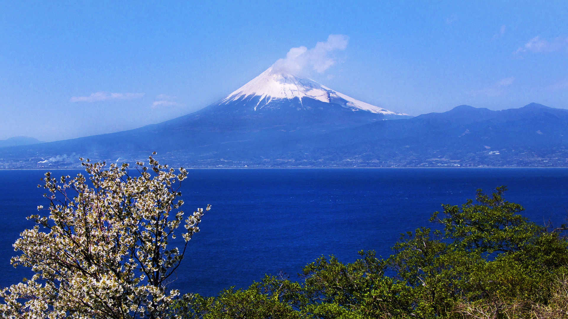 Heda, Numazu, Shizuoka Prefecture 410-3402, Japan